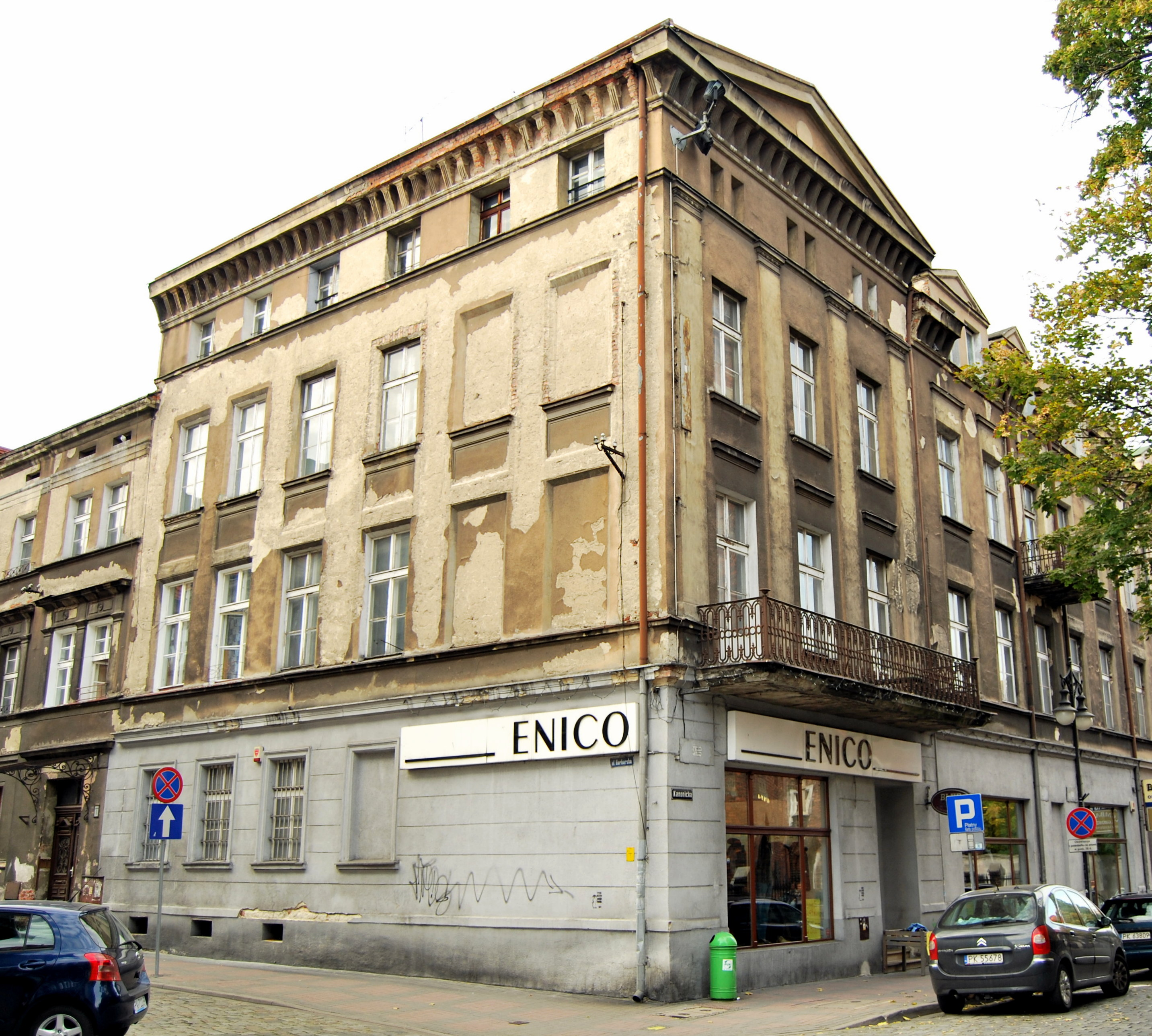 Kalisz, ul. Kanonicka 6 / ul. Garbarska 1 - hotel Wiedeński z 1847, 1920 (zabytek nr 535/A)